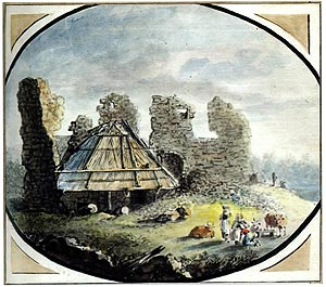 Krievciemsi vasallilinnuse varemed XVIII sajandi lõpus.